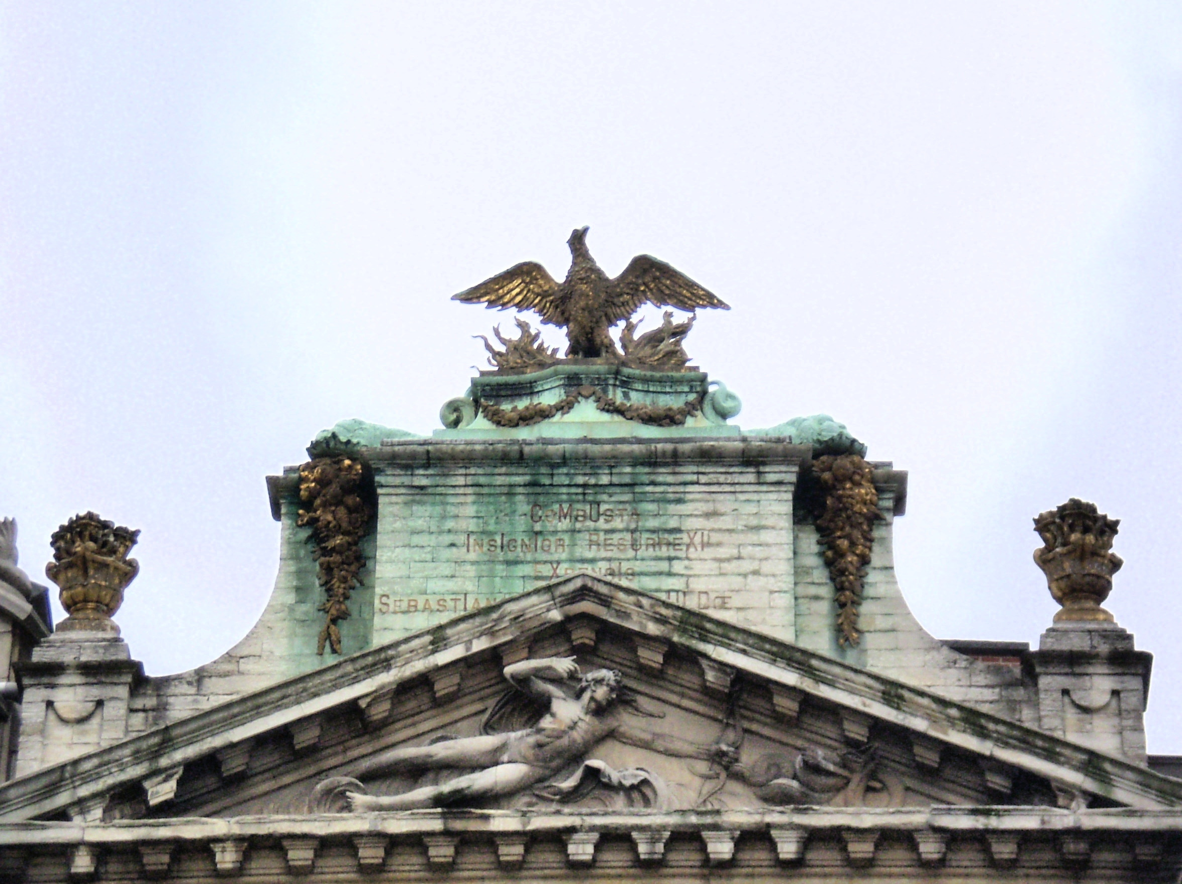 Grand-Place de Bruxelles, maison La Louve, Phénix renaissant de ses cendres et sortant des flammes, symbole de la reconstruction de la ville après le bombardement français de 1695.